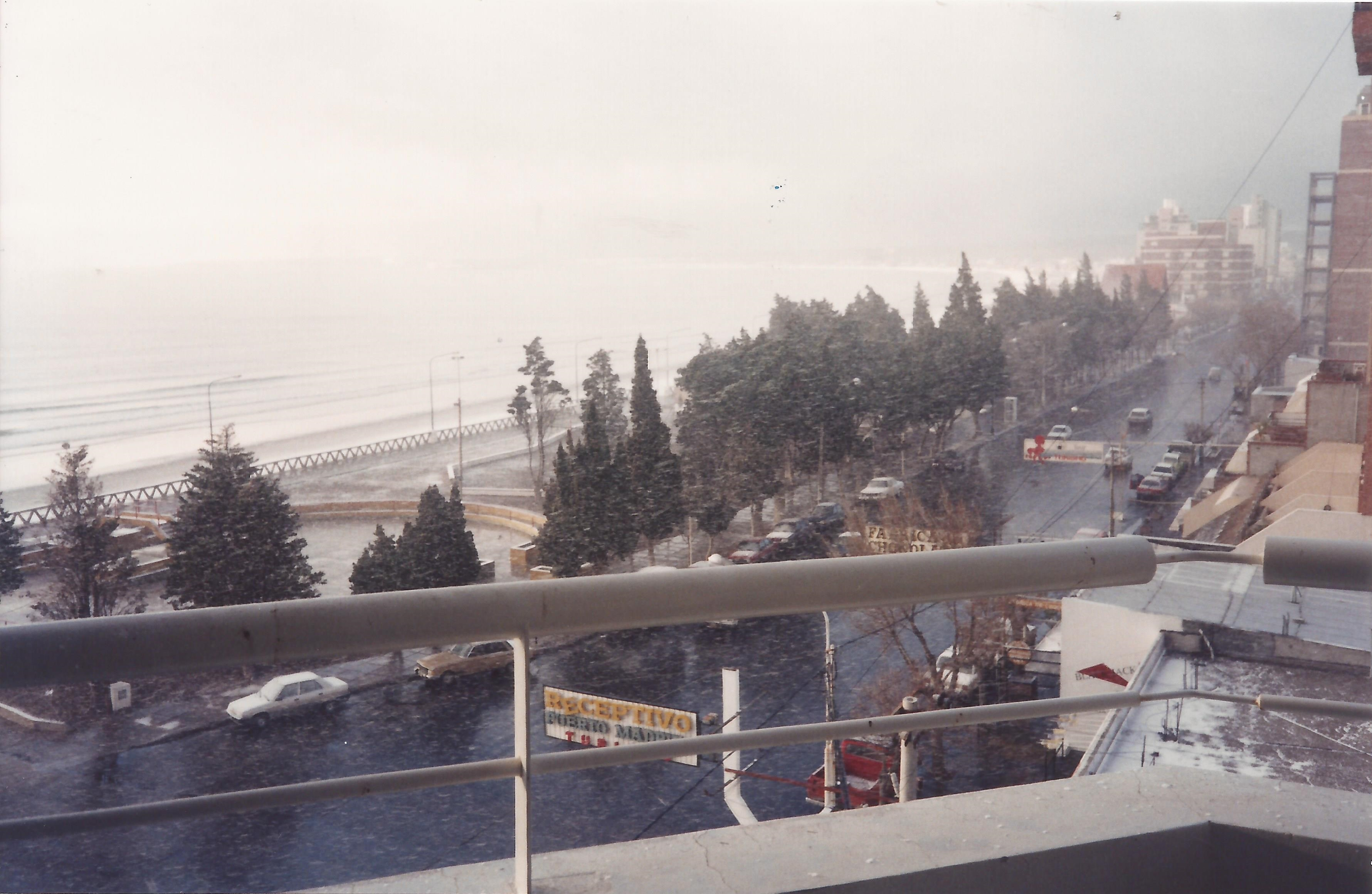 Puerto Madryn, Chubut, Patagonia, Argentina